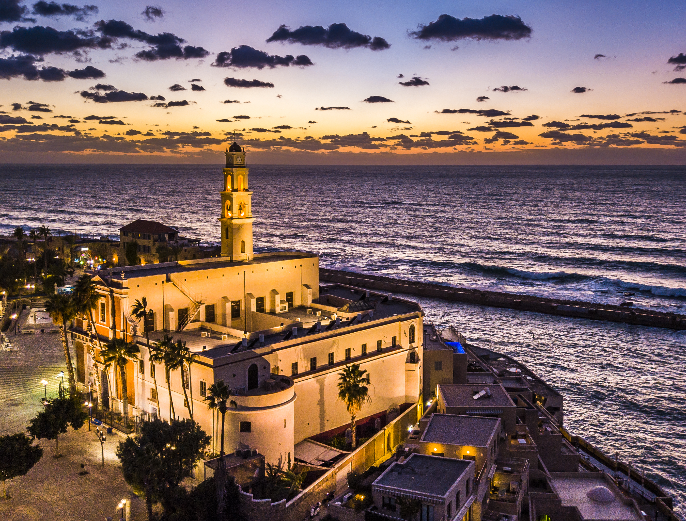 כנסיית פטרוס הקדוש היא כנסייה קתולית פרנציסקנית, השוכנת בכיכר קדומים, בפינה הצפון-מערבית של יפו העתיקה. כנסיית פטרוס הקדוש נקראת על שמו של פטרוס הקדוש, אחד משנים עשר השליחים של ישו והאפיפיור הראשון. מנזר קטן צמוד לכנסייה מצפון. המבנה ומגדל הפעמונים שלו נראים היטב מכל קו החוף של תל אביב ויפו, כמו גם מכיוון הים, ולכן הם שולבו בקצה הימני של סמל העיר תל אביב-יפו הקודם. שימו לב: אין לבלבל בין כנסייה זאת לבין הכנסייה הנקראת גם היא "פטרוס הקדוש" הנמצאת באזור אבו כביר בתל אביב.